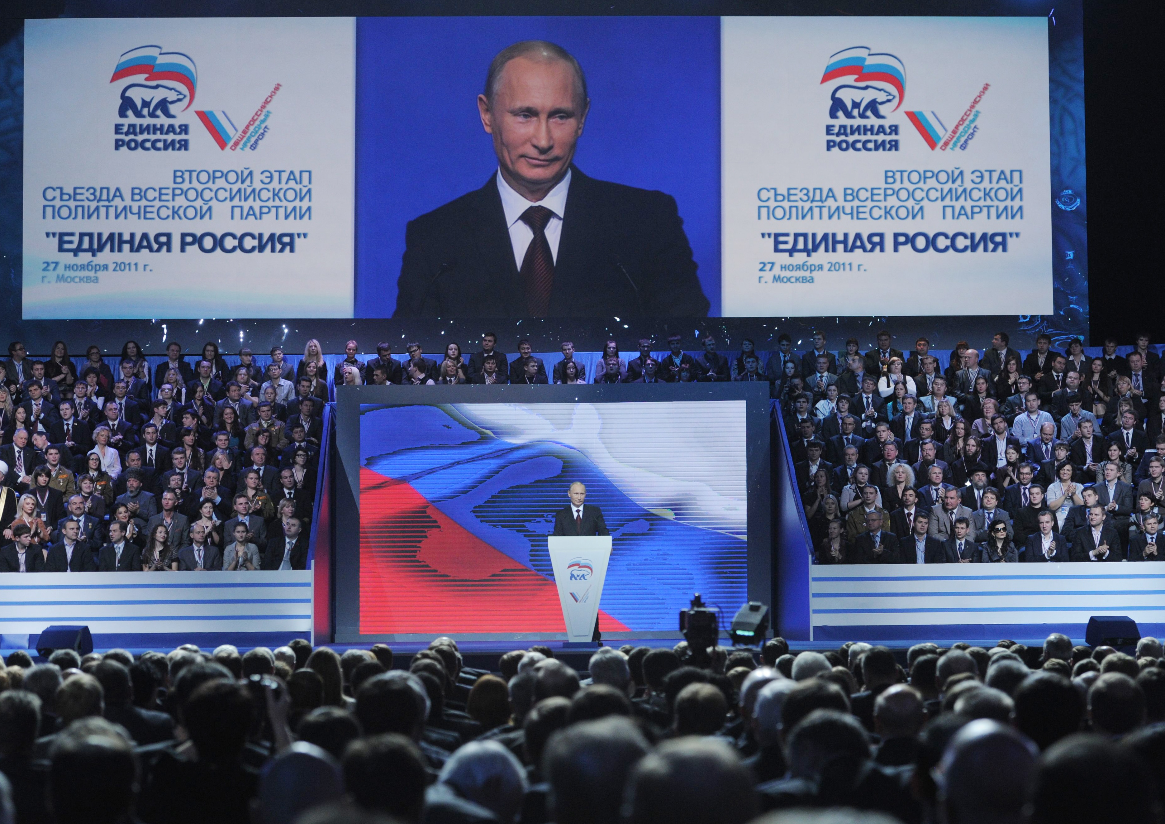 Владимир Путин выступает на предвыборном съезде партии "Единая Россия" 27 ноября 2011 года